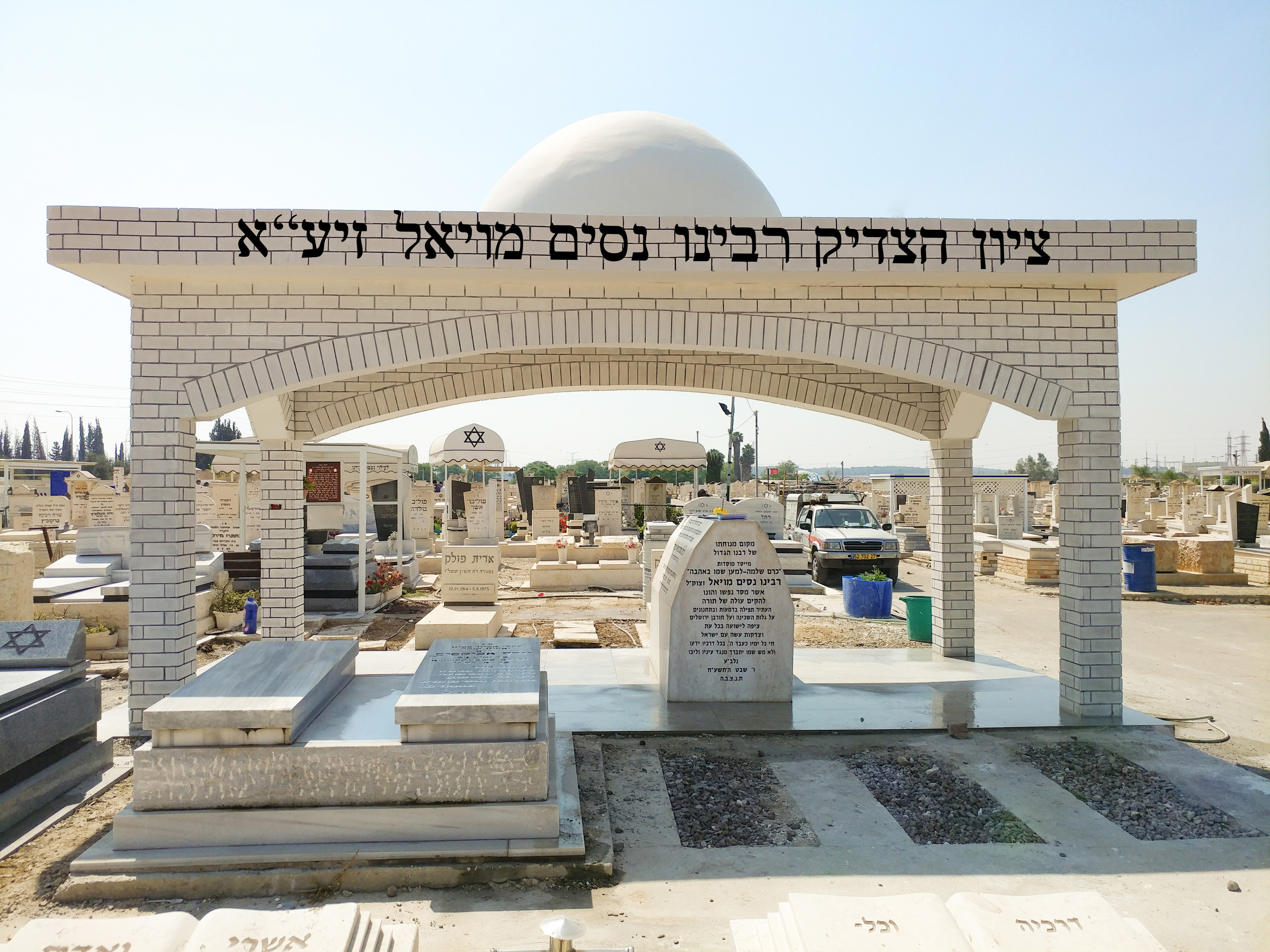 האוהל שהוקם על קברו של הרב נסים מויאל זצ"ל